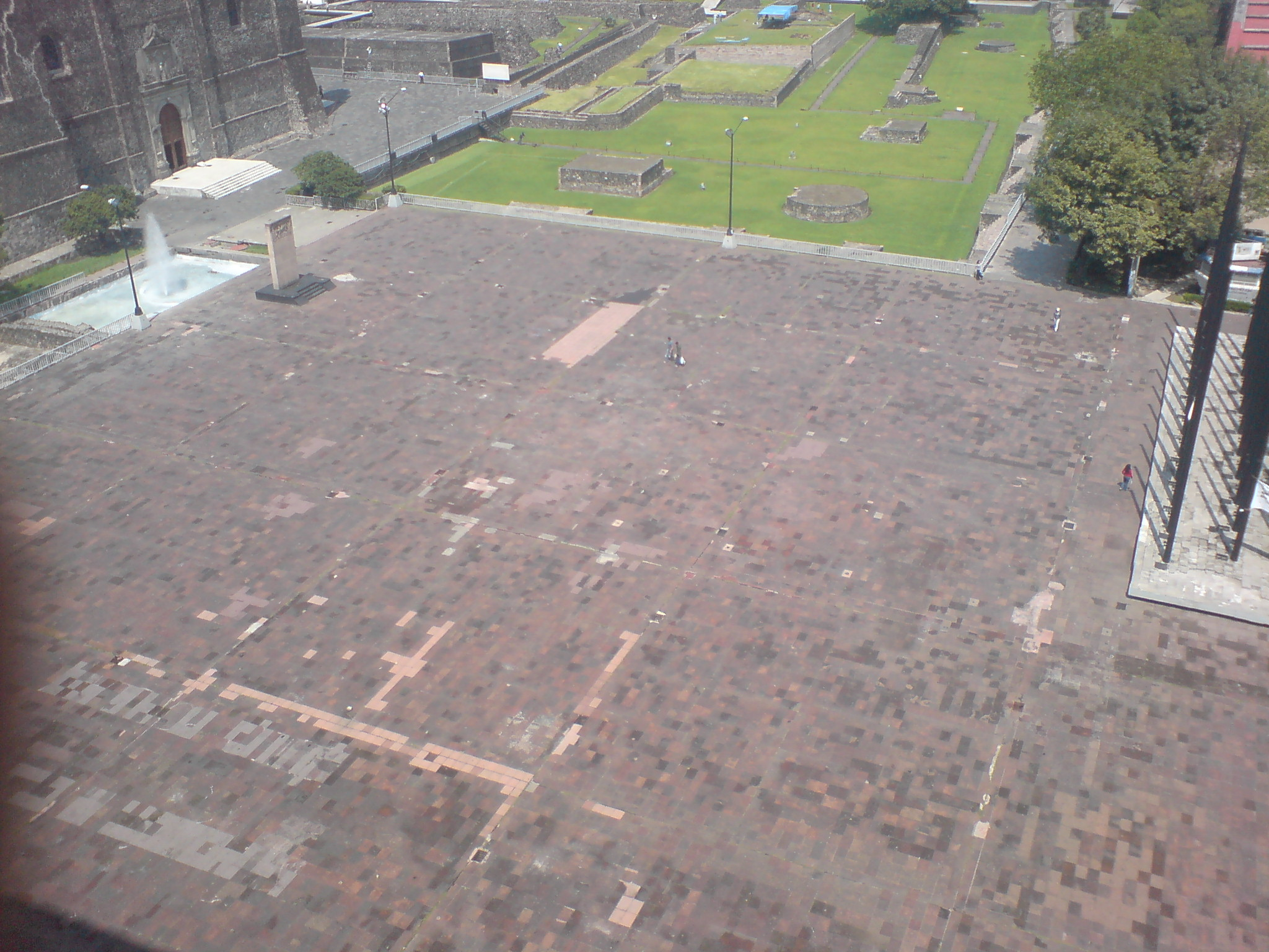 Plaza de las tres culturas vista desde el edificio Chihuahua